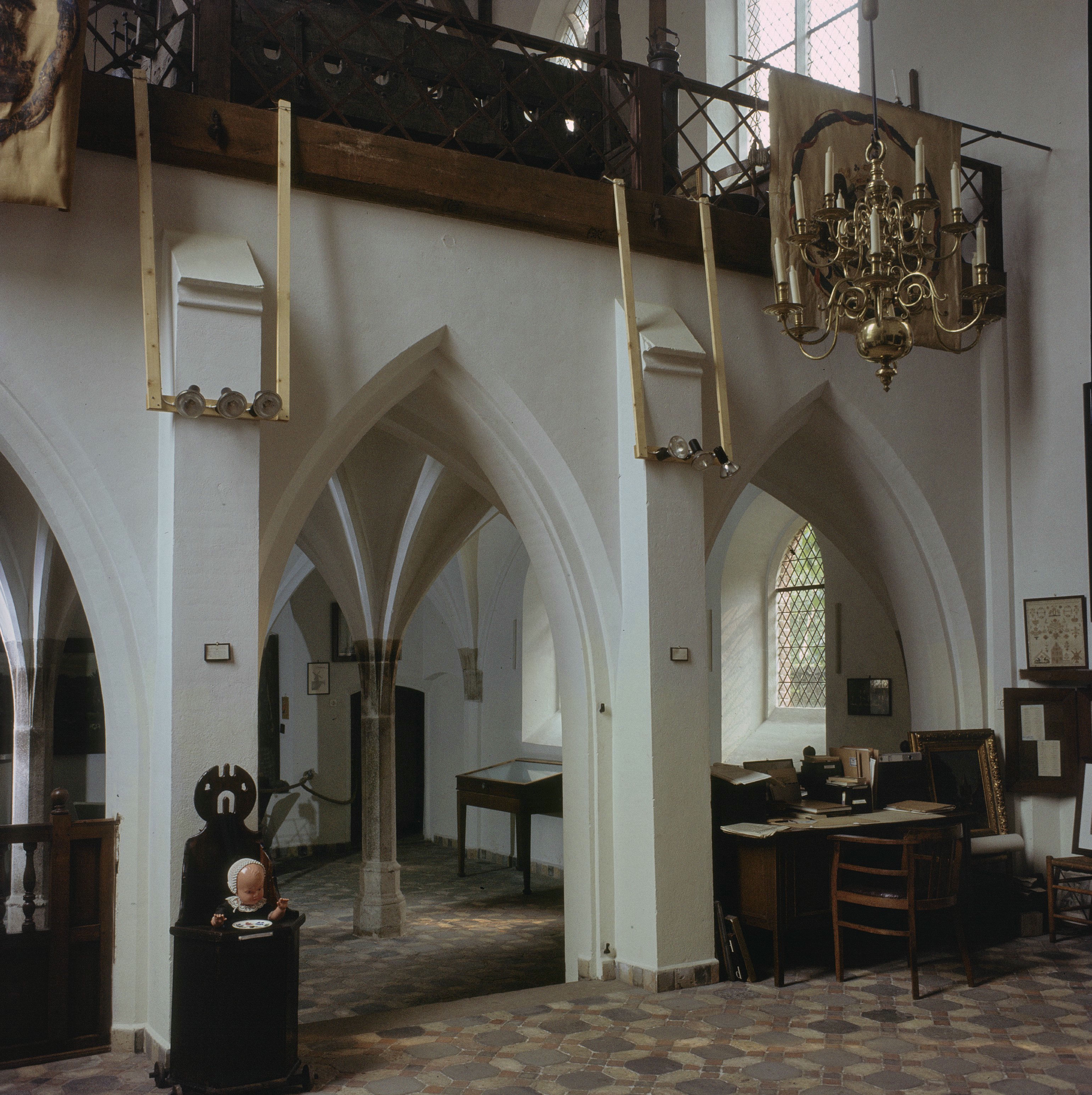 Voormalig Sint Agnietenklooster: Interieur van de kloosterkapel